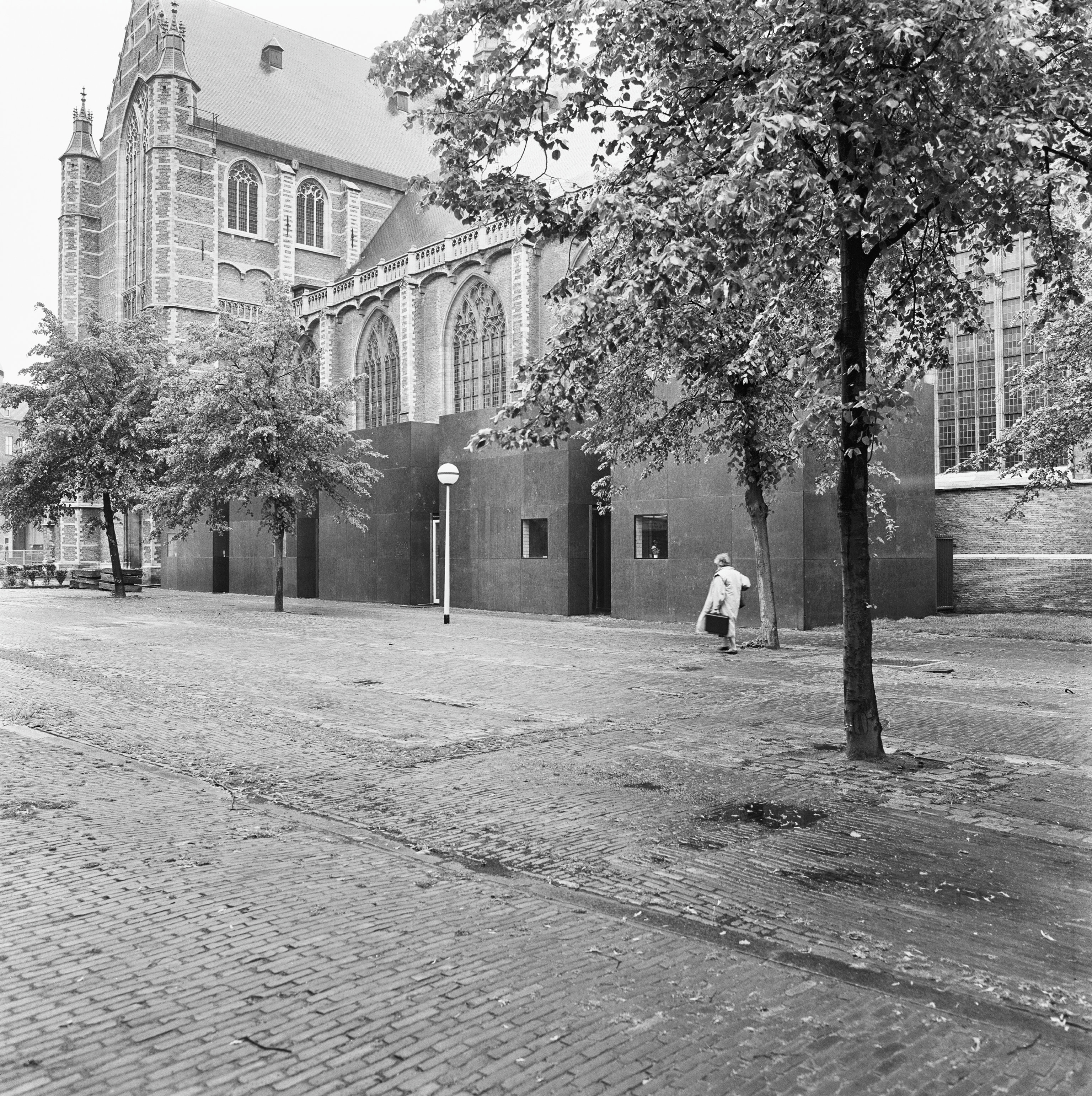 NEDERLANDS HERVORMDE KERK (ST.LAURENSKERK): Exterieur NOORDGEVEL, KUBUSVORMIGE AANBOUWEN